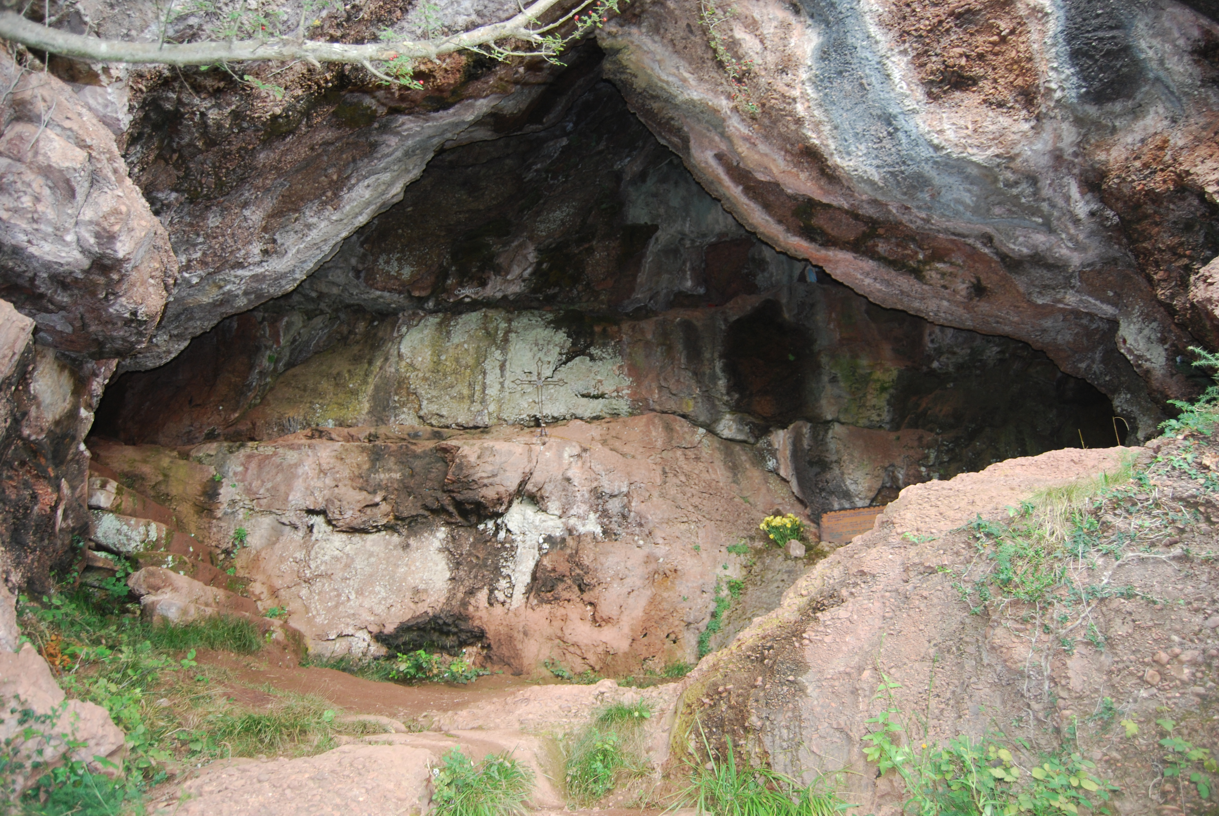 Entrée de la grotte du Saint qui sue (Harpeko Saindua).